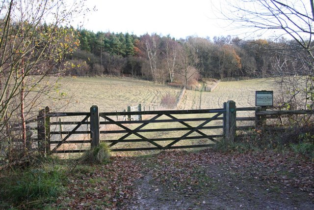 Robert's Field